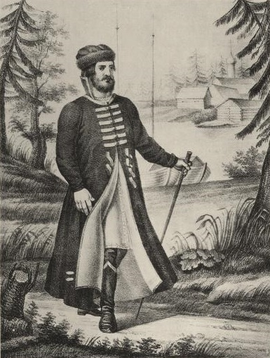 Русская одежда в XIV до XVIII столетия, ферязь и шапка.